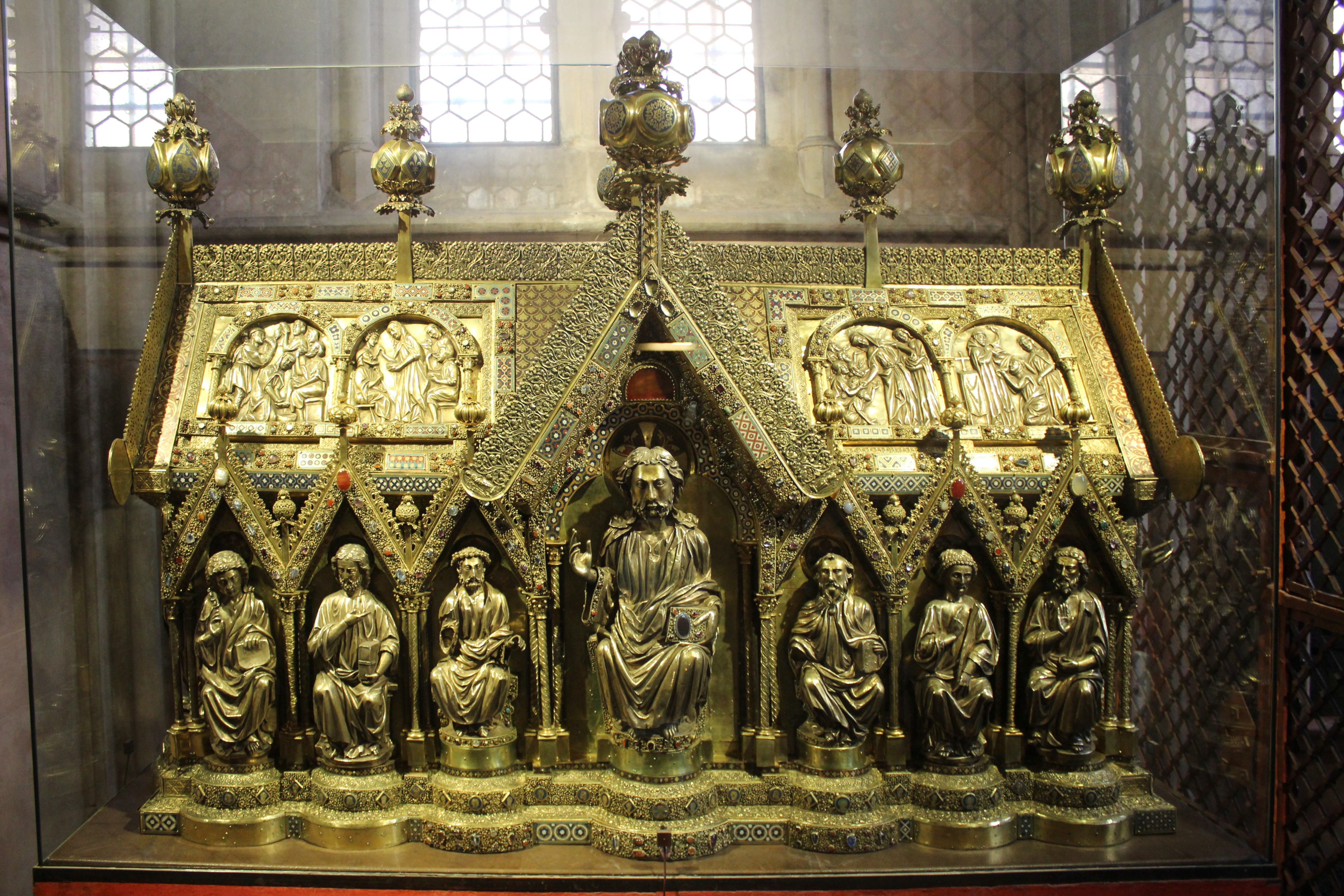 Elisabethschrein der Elisabethkirche Marburg, Landkreis Marburg-Biedenkopf, Hessen, Deutschland